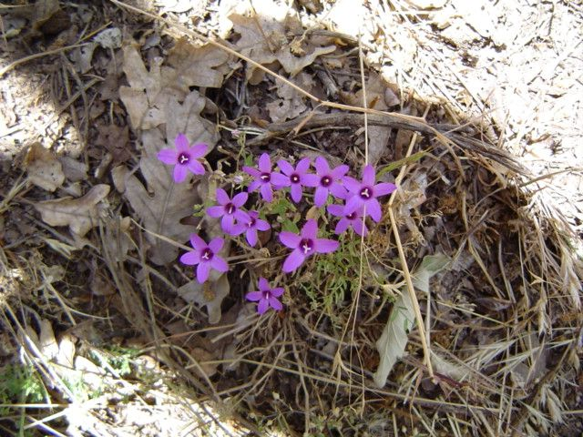 Campanula lusitanica Valle de Amblés. Ávila. España